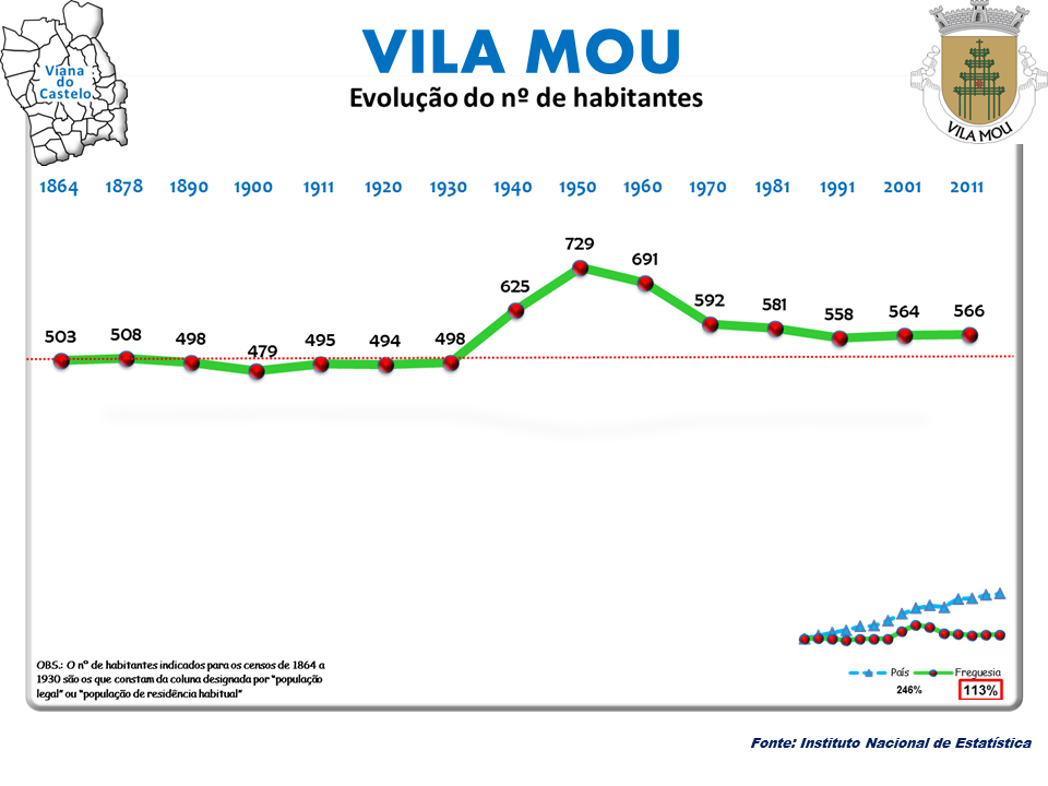 Censos 1864/2011